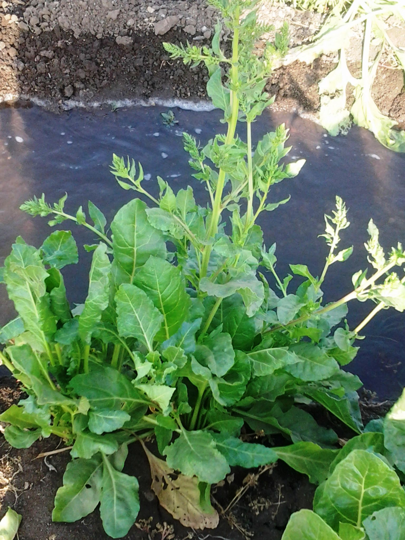 نبات الكرفس يظهر مختلطًا مع أوراق السلق في أحد الحقول المصرية.